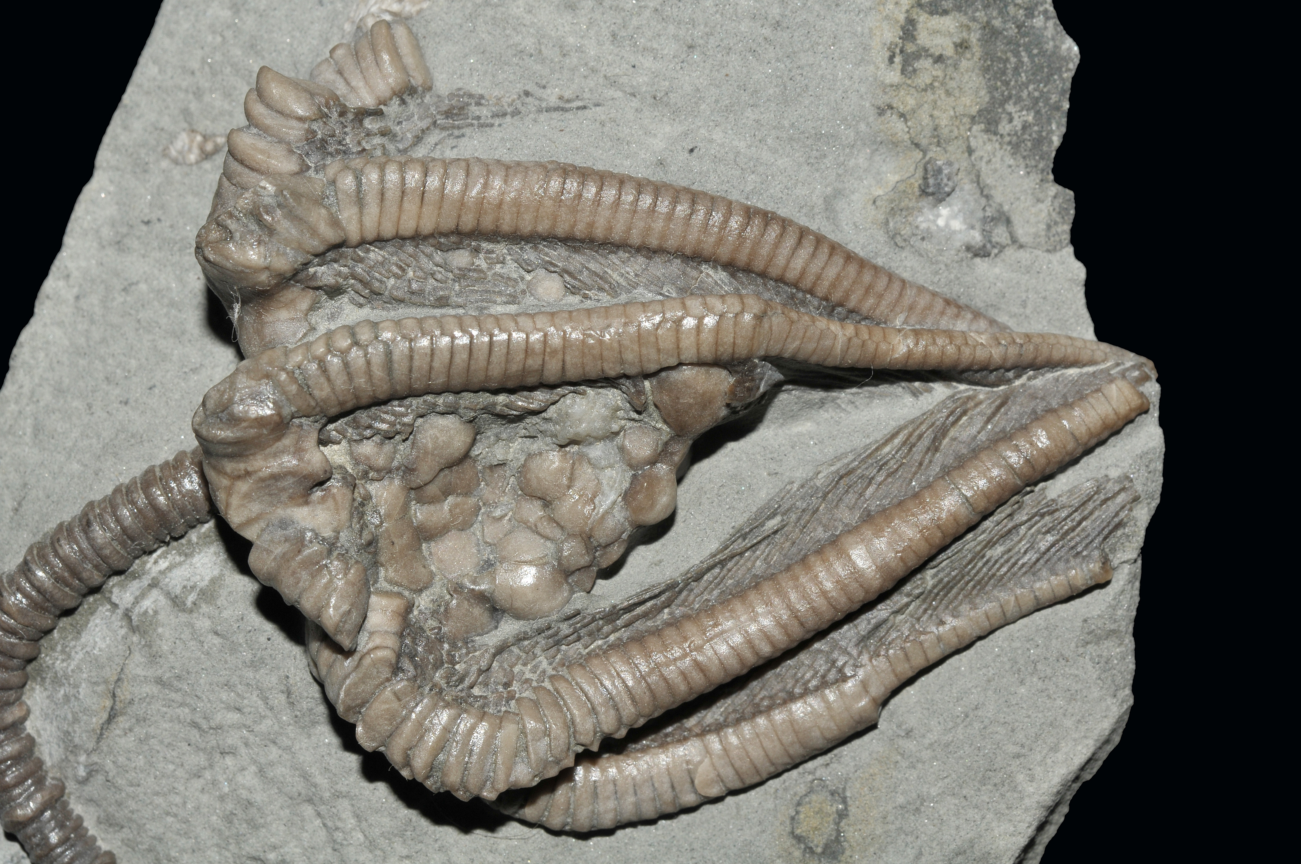 Agaricocrinus americanus